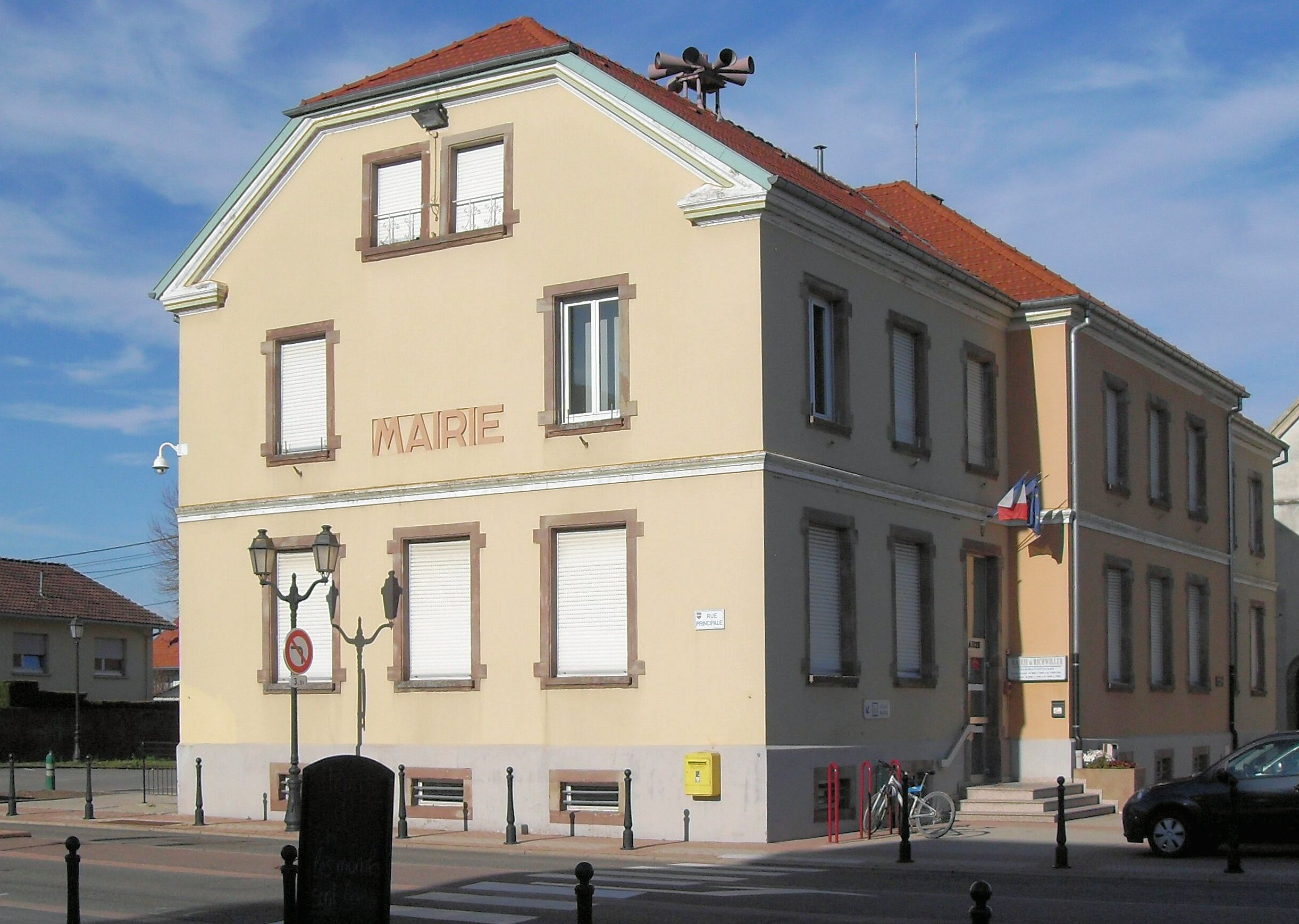 La mairie de Richwiller